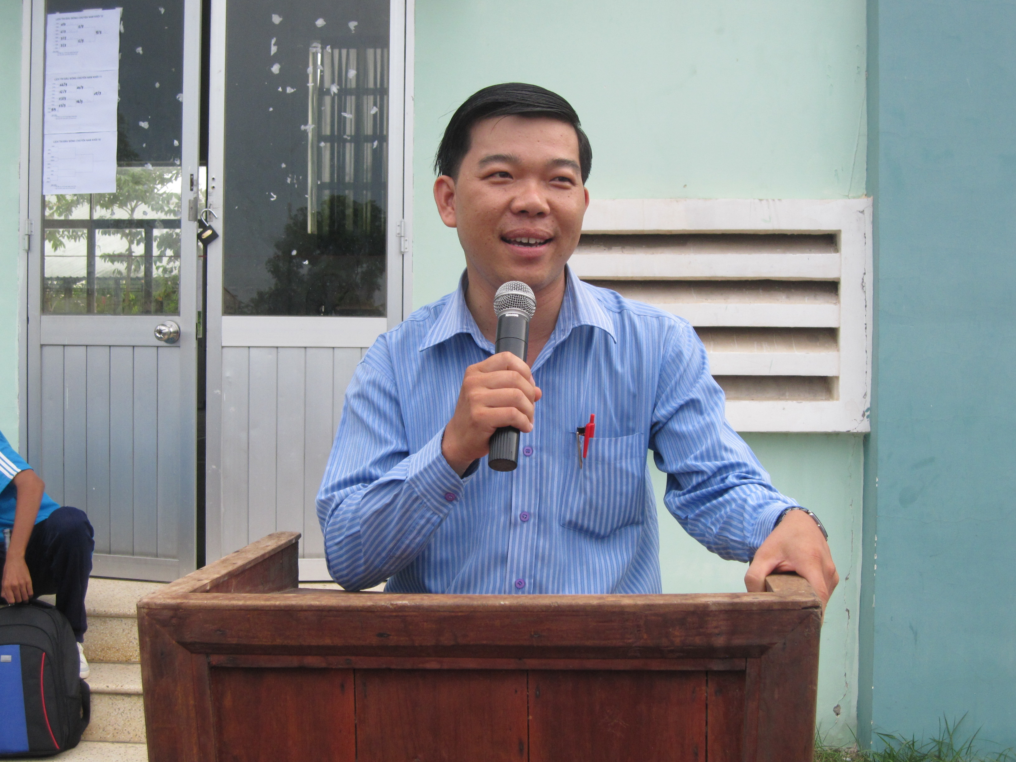 thầy Cải - phó hiệu trưởng